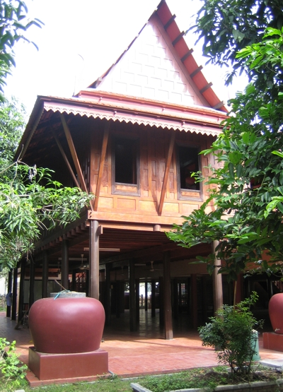 Chris Baker, 'Khun Chang's House' at Wat Palelai, Suphanburi